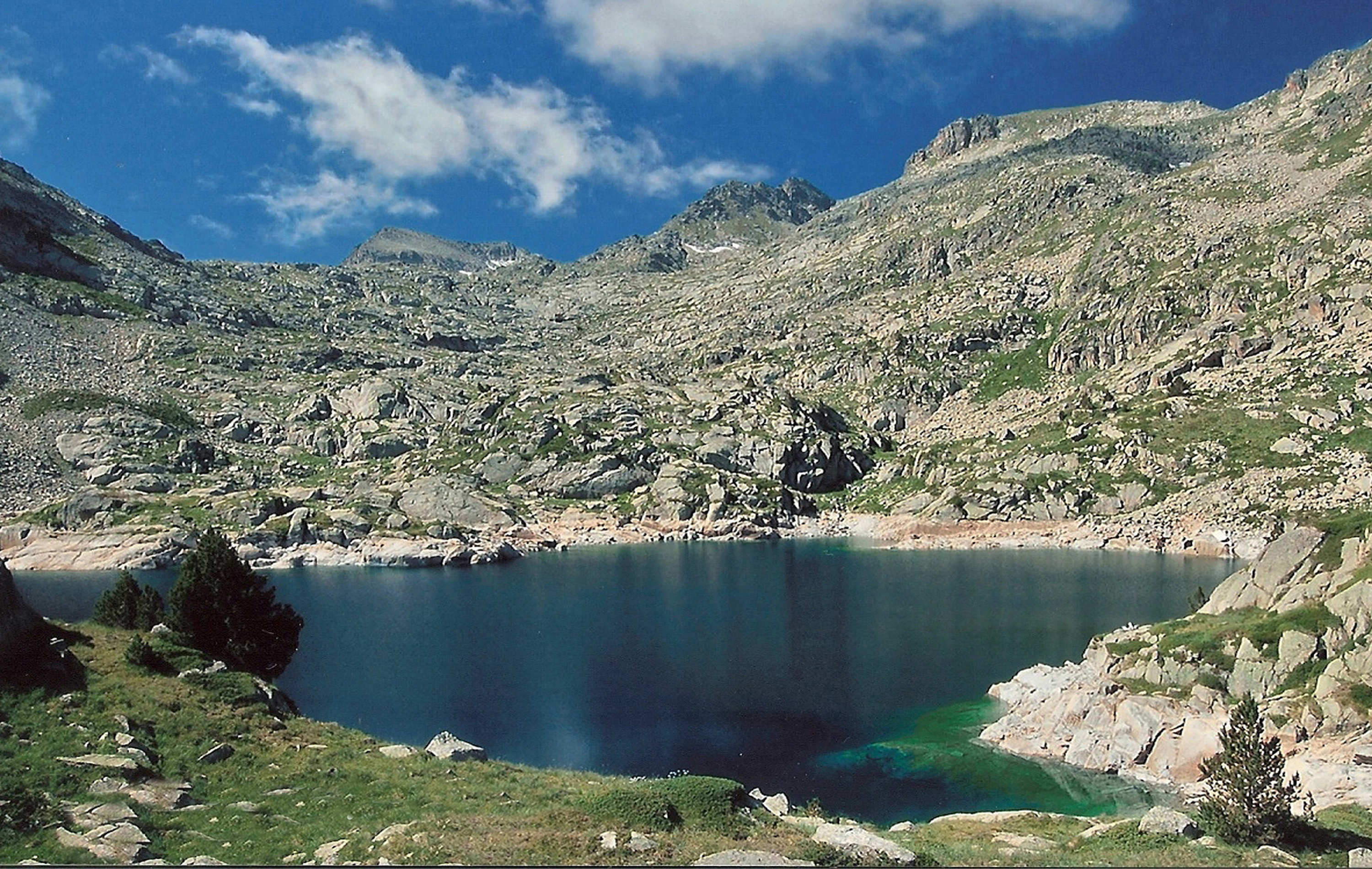 Estany de Ribereta de Baish, municipi de Naut Aran, en la zona perifèria de protecció del parc nacional d'Aigüestortes This is a a photo of a wetland in Catalonia, Spain, with id: IZHC-99999999